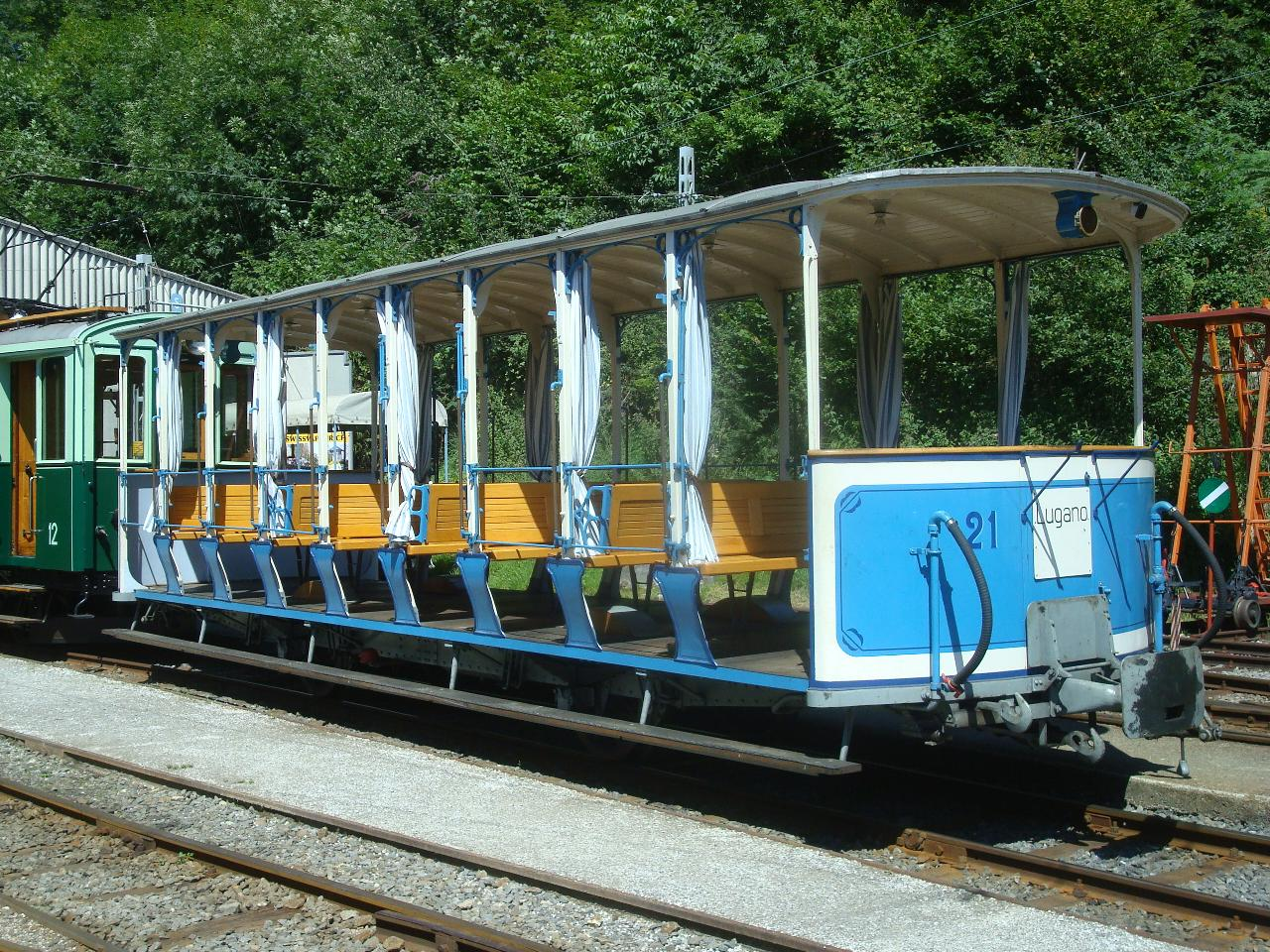 Sommerwagen C2 21 der Lugano–Cadro–Dino-Bahn (LCD) bei der Museumsbahn Blonay–Chamby (BC) in Chaulin im Sommer 2010.